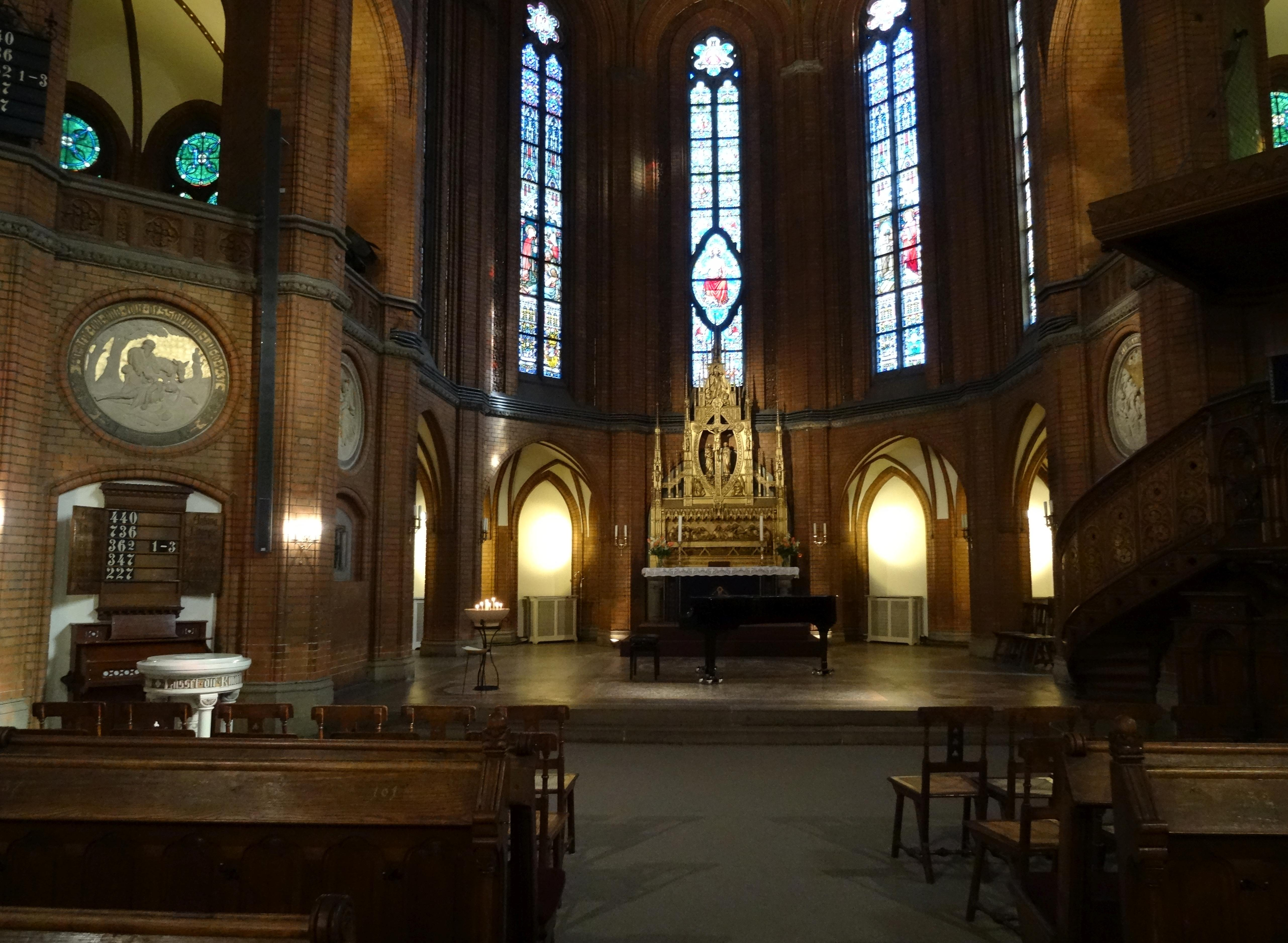 Der Altar in St.Johannis Hamburg-Harvestehude ist ein Werk des Bildhauers Fritz Neuber